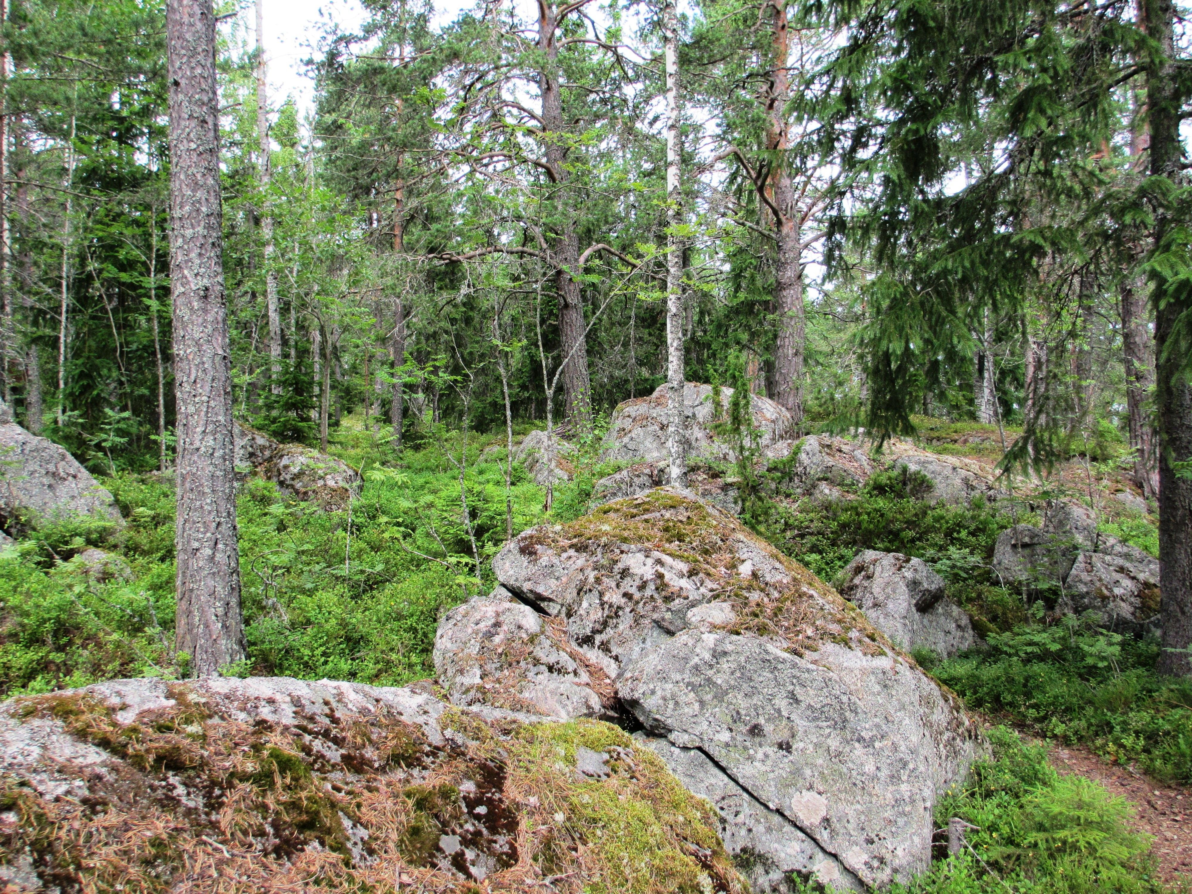 Västra berget, Söderhamn